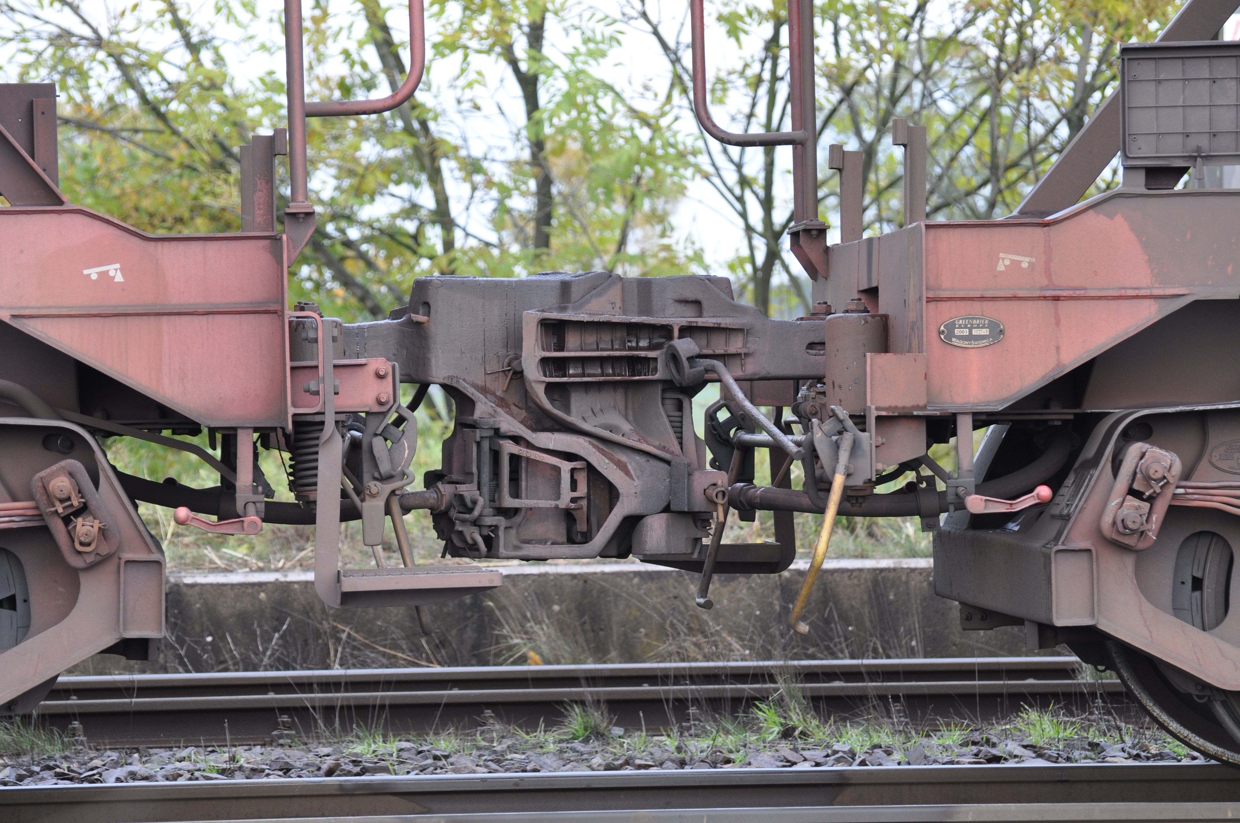 Mittelpufferkupplung zwischen zwei Güterwagen gekuppelt.